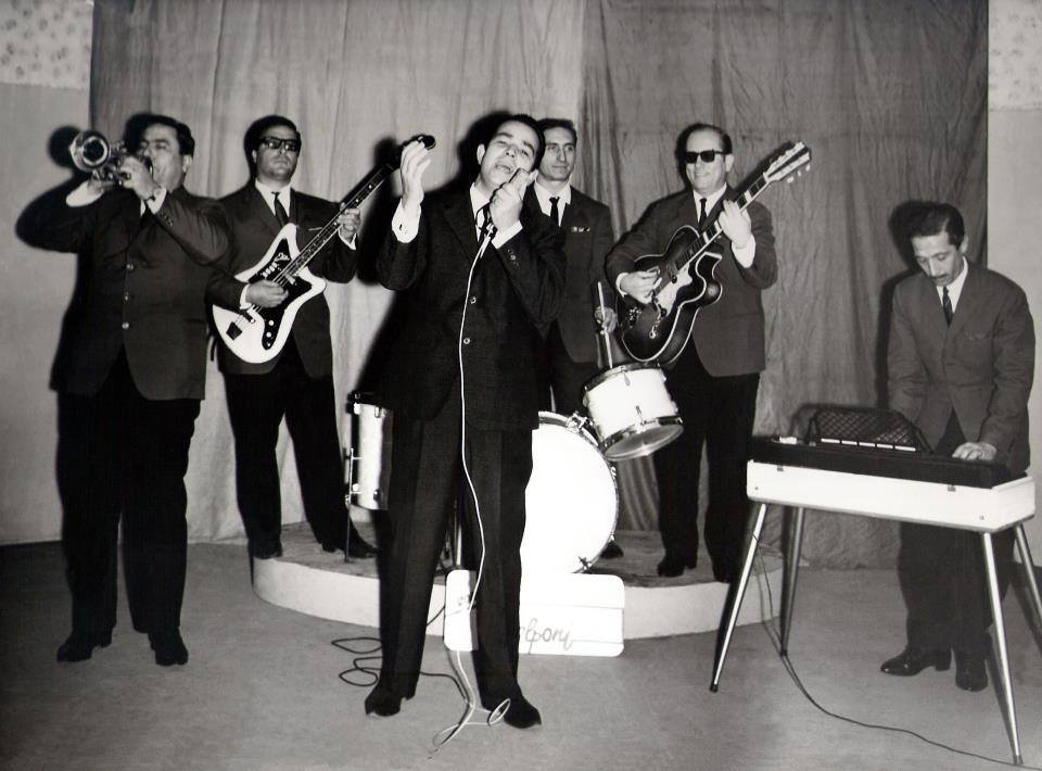 Tony Piaceri insieme alla sua band musicale " I Volponi " band composta da: Nanni Serra, Raimondo Casti, Gianni Pilia, Silvio Bianchi, Giampaolo Pagliero.